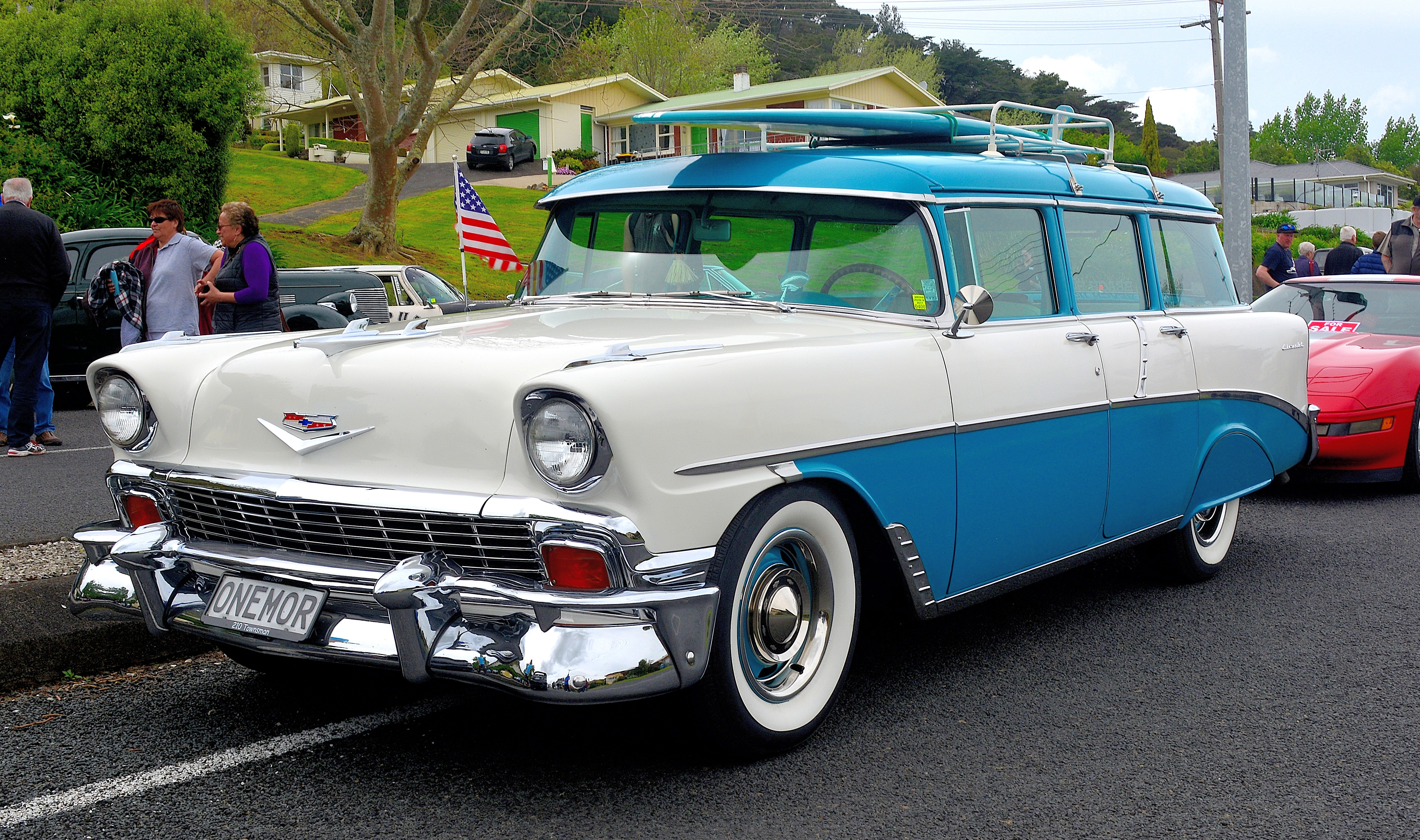 Te Aroha,Waikato,New Zealand